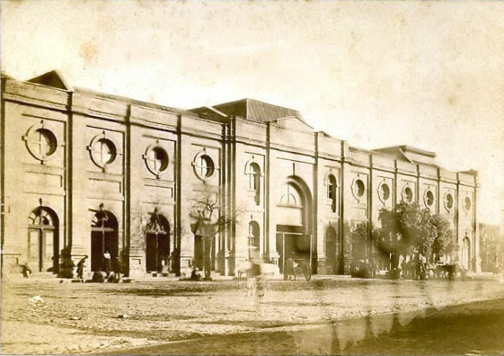 Edificio del mercado Cardonal antes de derrumbarse por el terremoto de 1906